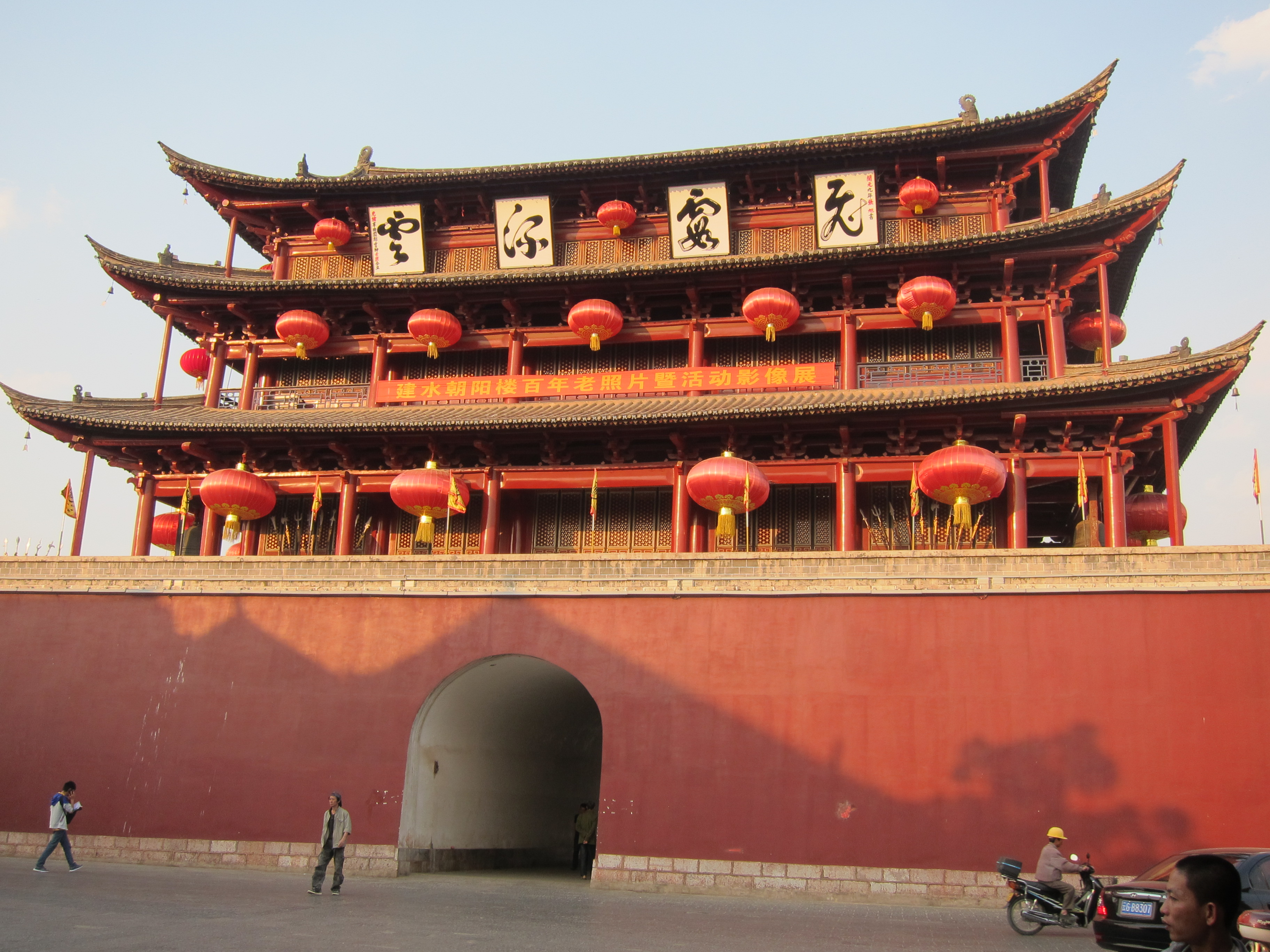 Jianshui